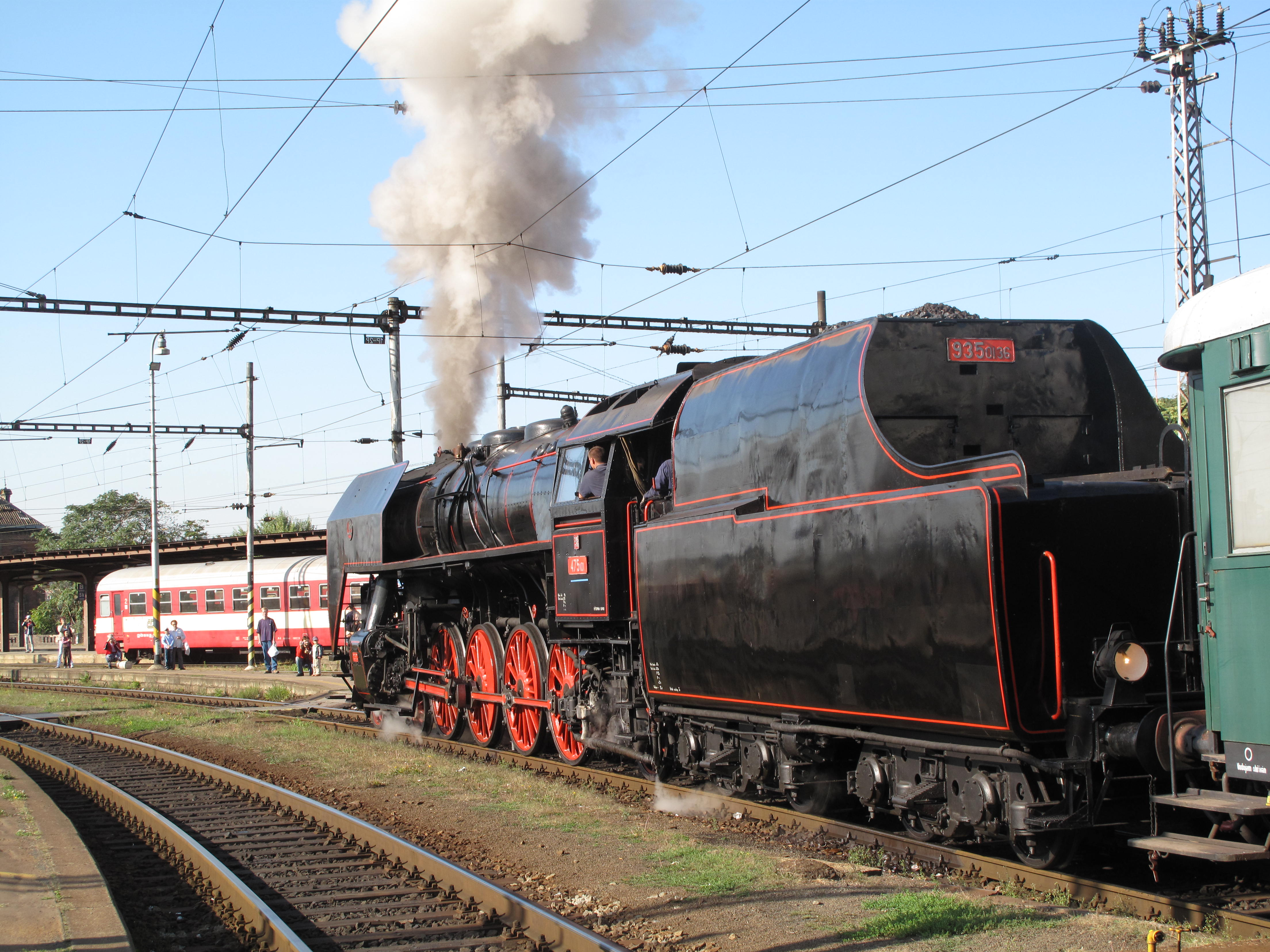 Parní lokomotiva v Brně